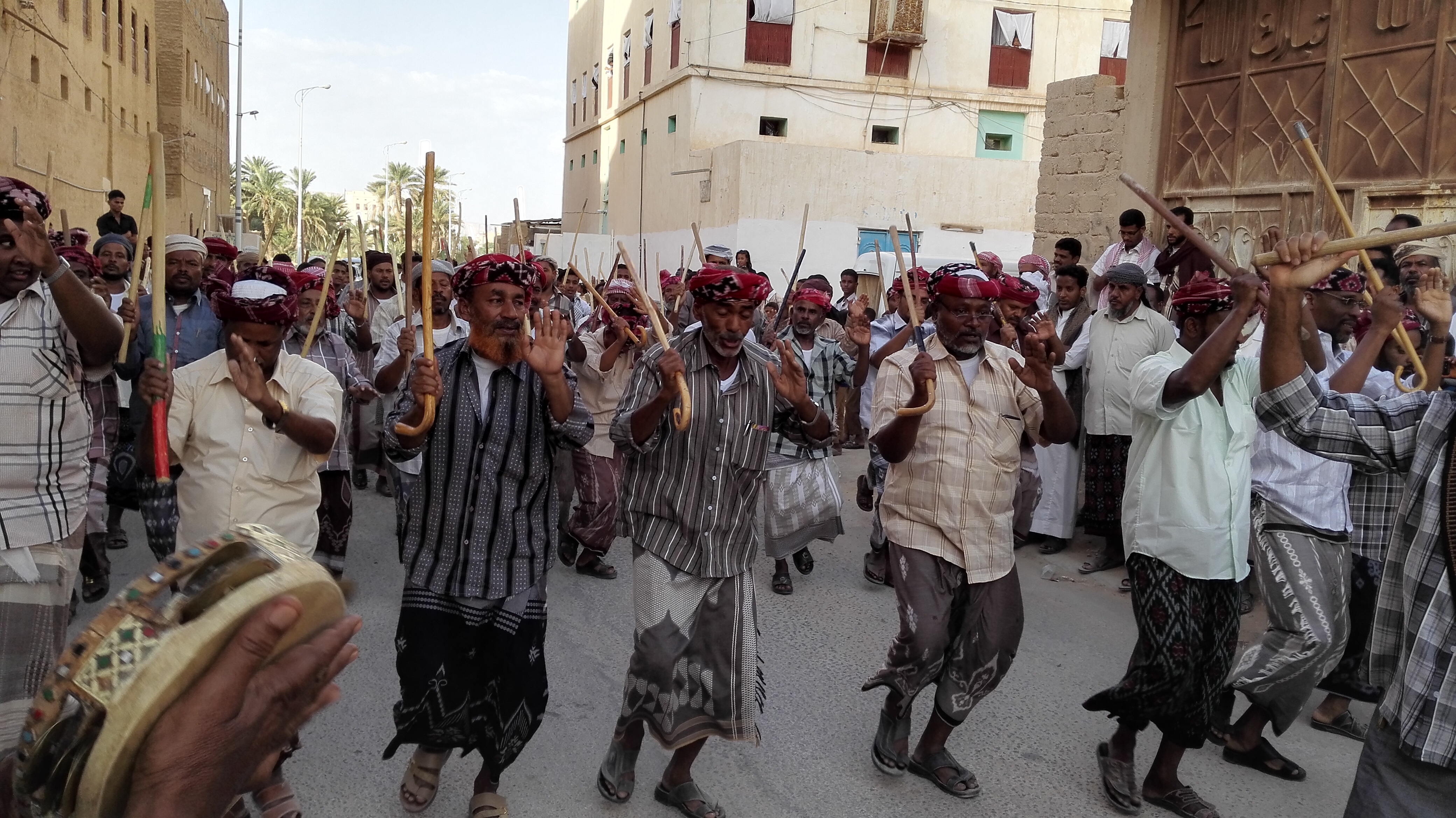 الشبواني رقصة شعبية تنسب في تسميتها إلى مدينة شبوة في اليمن, وتعتبر رقصة الشبواني من أبرز الألعاب الشعبية في حضرموت